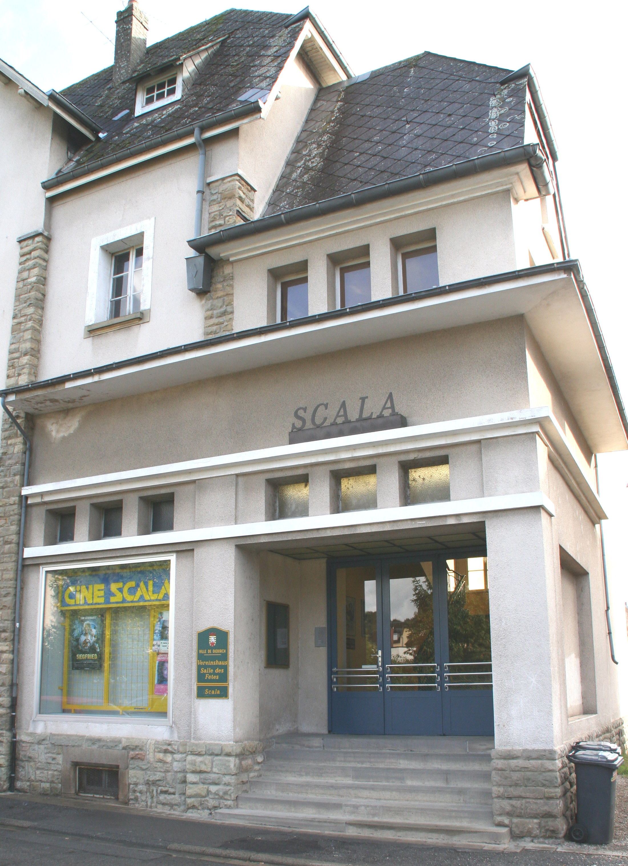 Scala Gebai.